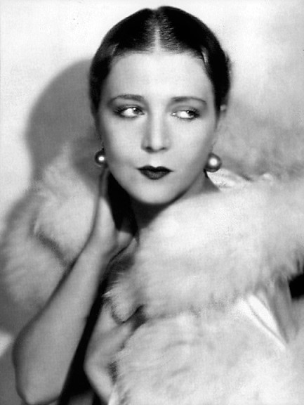 Vilma Banky